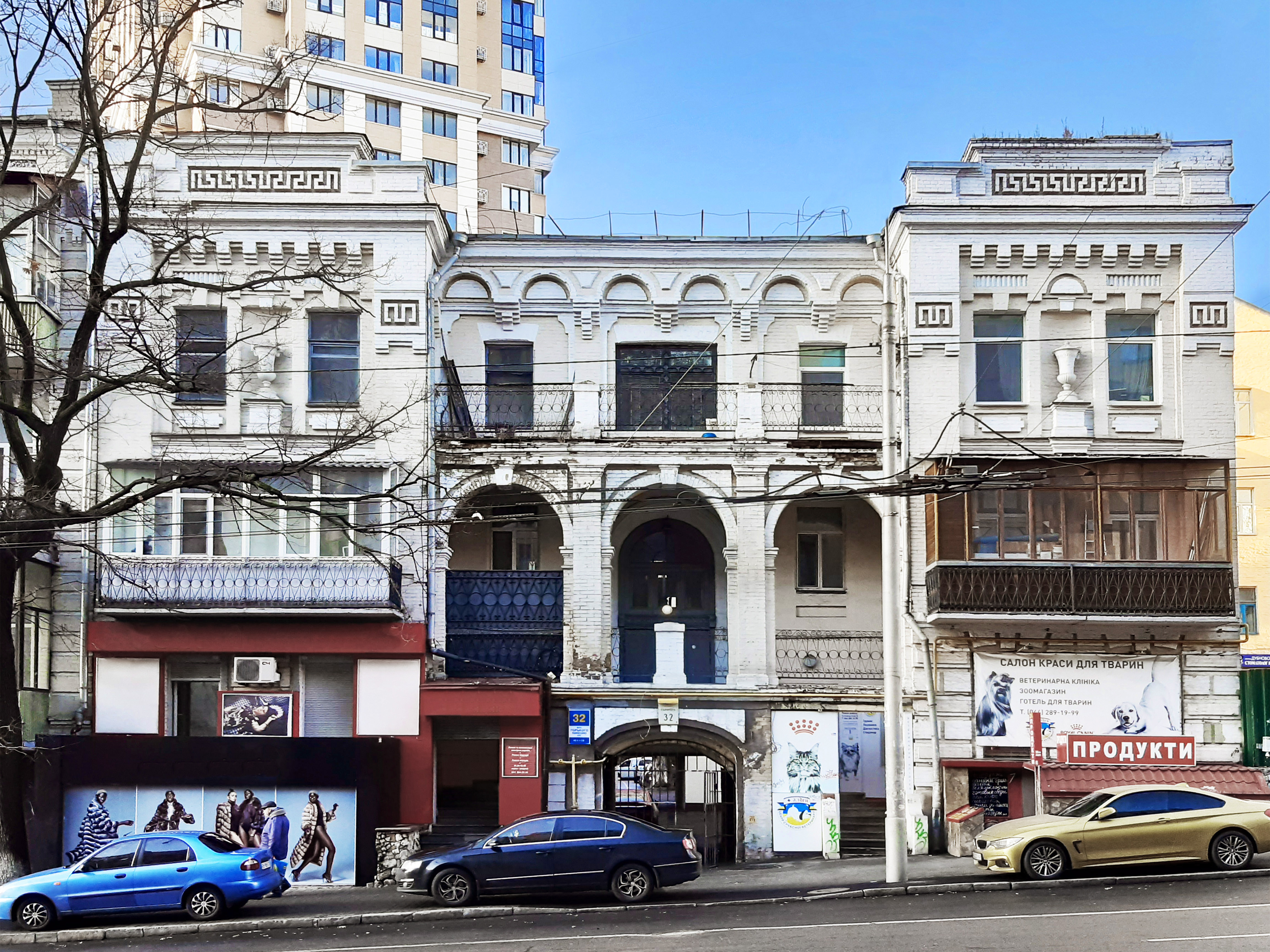 Жилий будинок, Київ, вул. Антоновича, 32